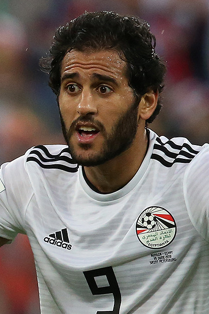 Историческая победа сборной России в матче с Египтом!